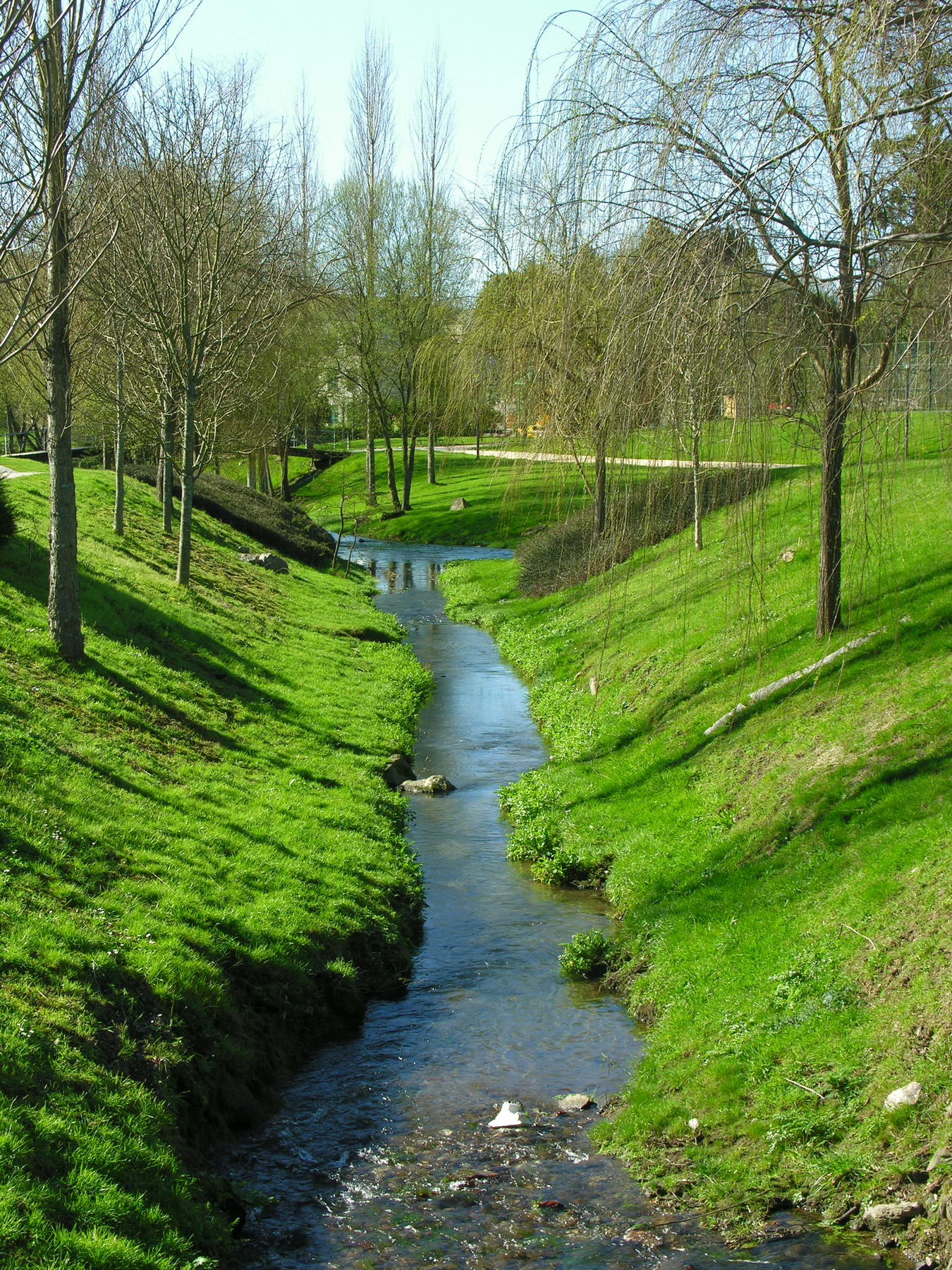 Río do Corvo, Santiago de Compostela, Galiza, Spain.